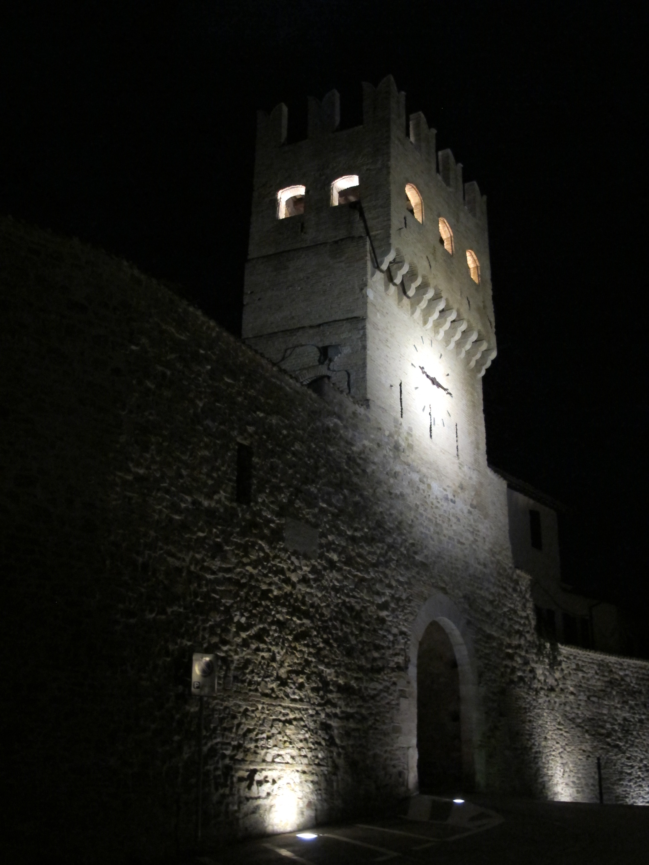 Montefalco, porta s. agostino